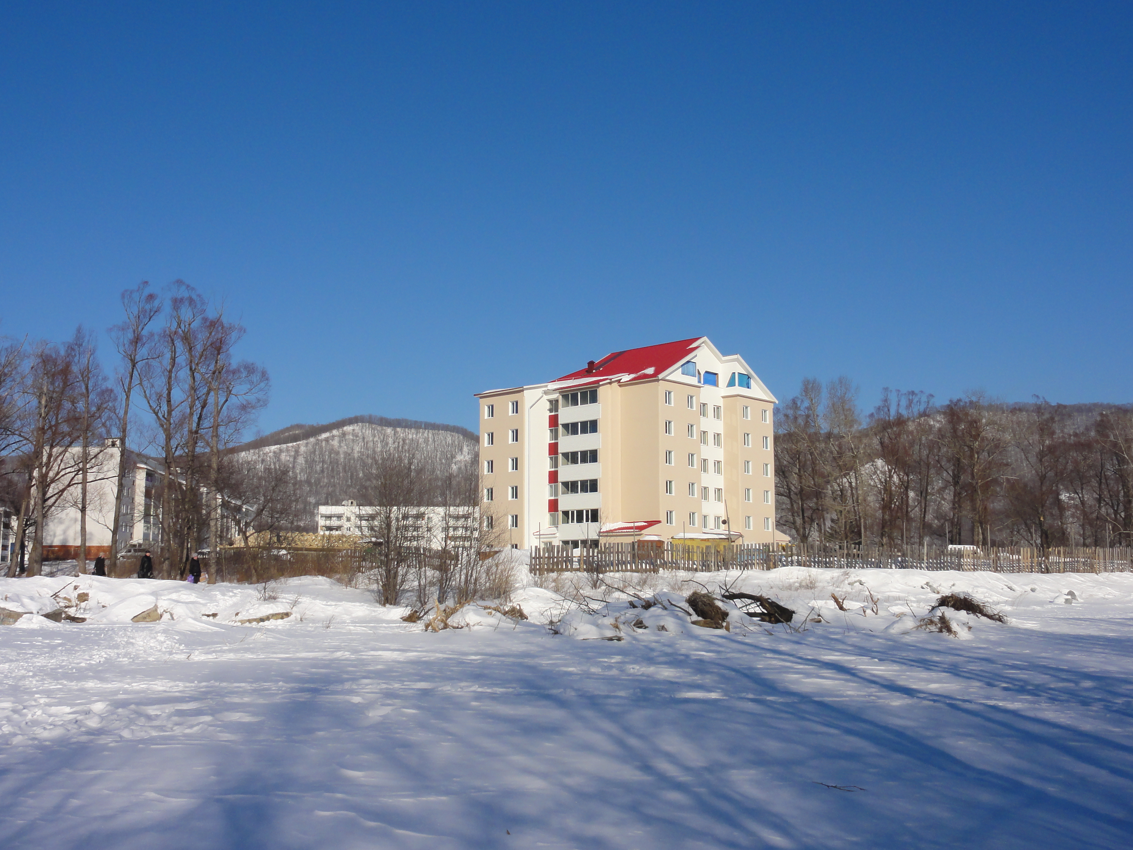 Недостроенная девятиэтажная свечка